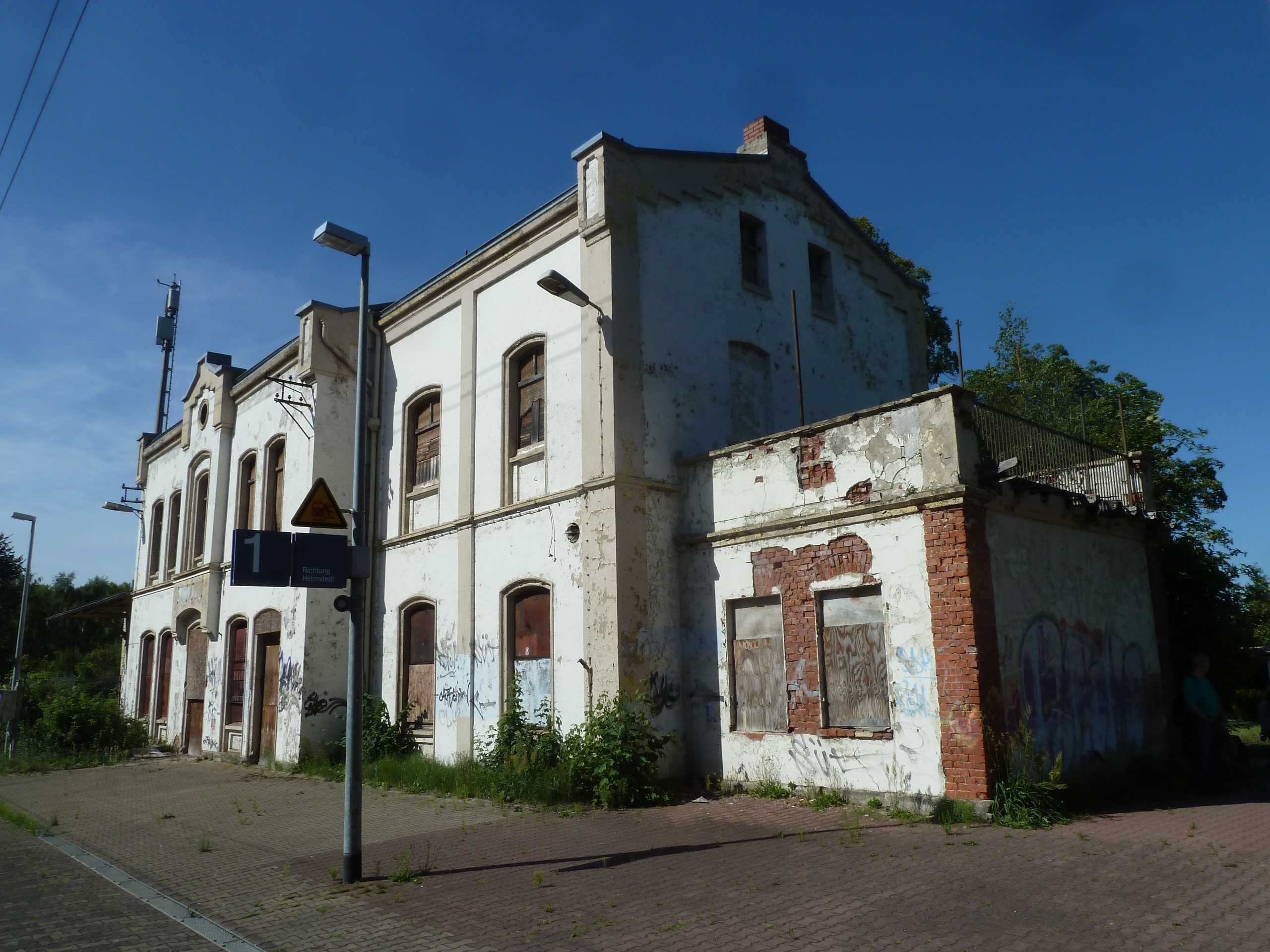 Bahnhof Wefensleben, Baudenkmal, Empfangsgebäude